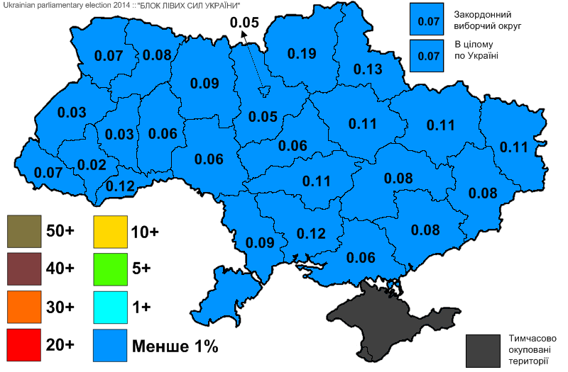 Результати виборів до Верховної Ради України, які відбулись 25 жовтня 2014 року. Інформація з офіційного сайту ЦВК. ПОЛІТИЧНА ПАРТІЯ "БЛОК ЛІВИХ СИЛ УКРАЇНИ".